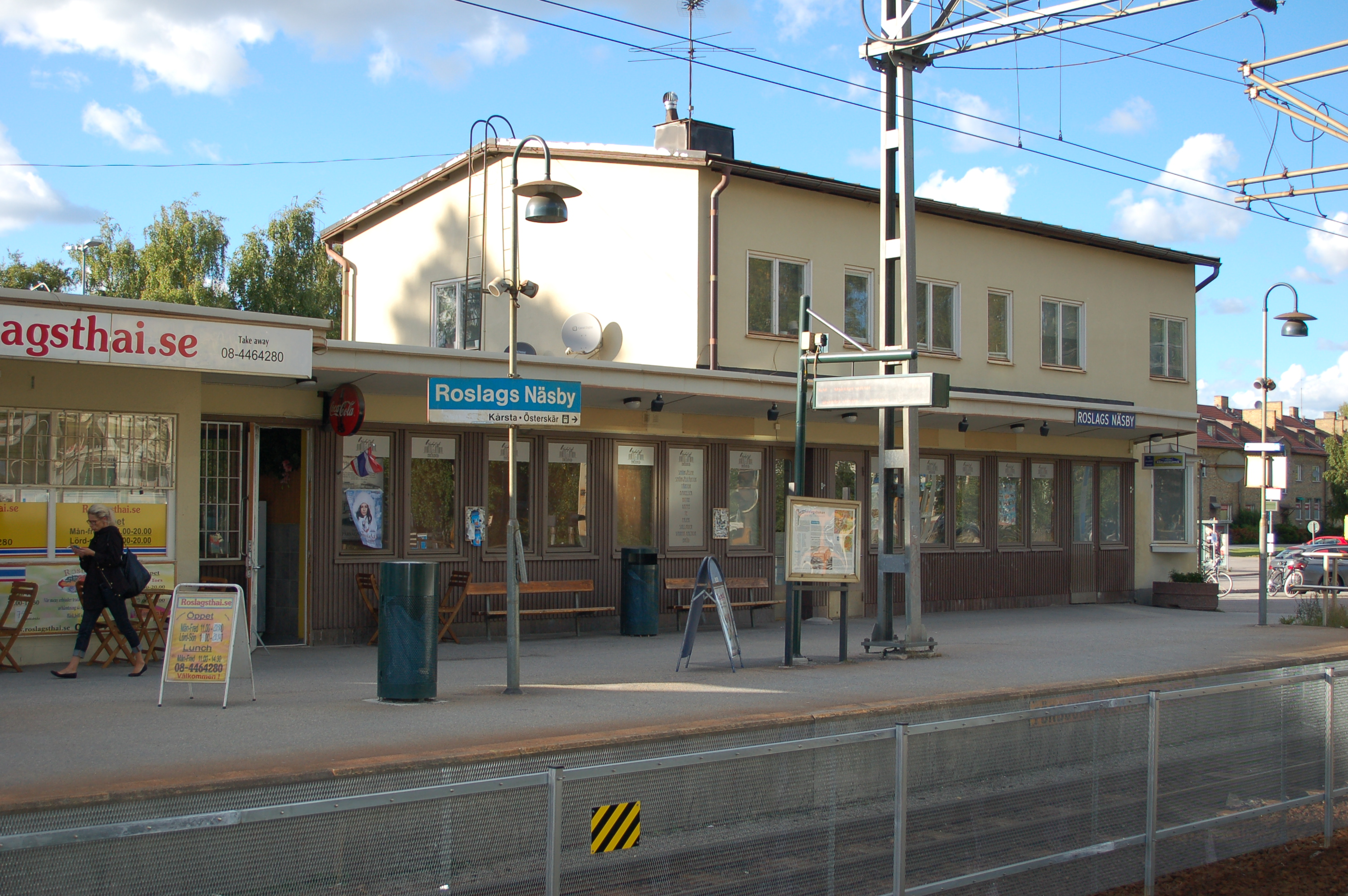 Stationshuset i Roslags Näsby.